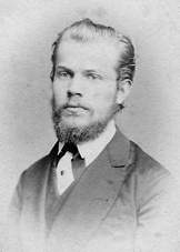 František Liebscher, český právník, kreslíř a malíř autodidakt